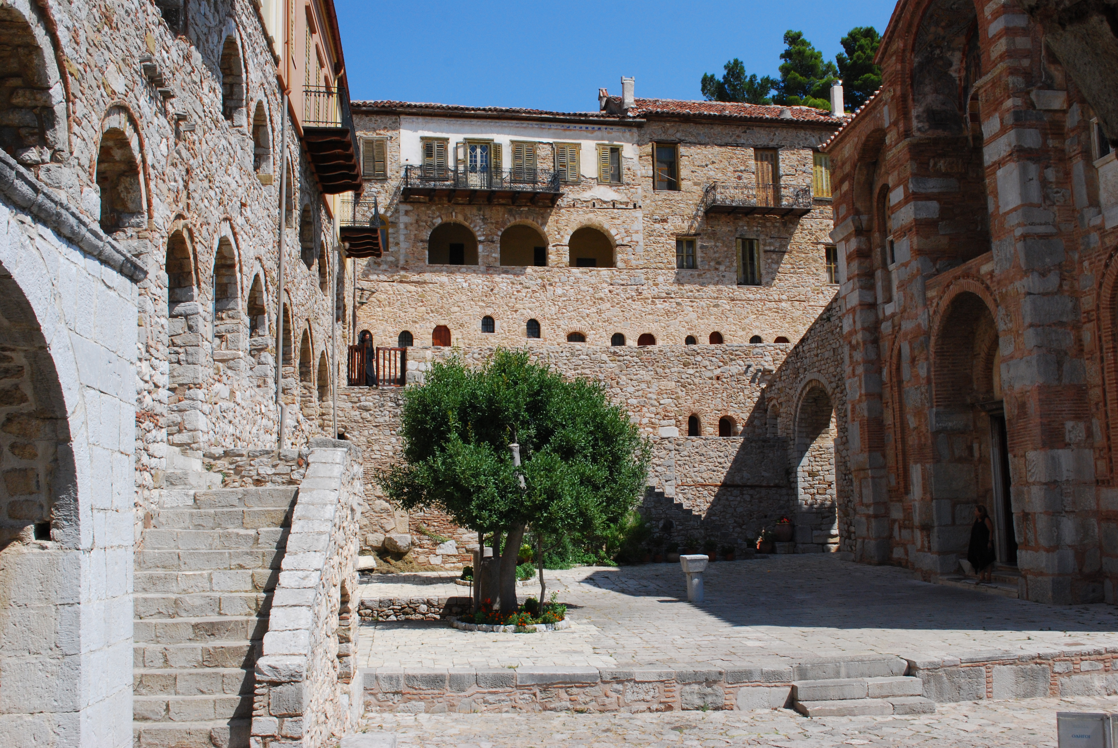 Vue du monastère d'Hosios Loukas.